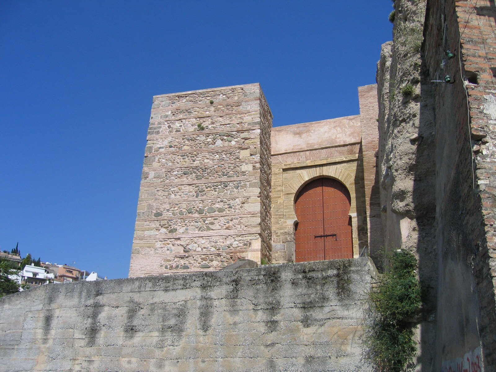 Puerta Monaita en el barrio del Albaicín en Granada (España). Bien de interés cultural RI-51-0000579 declarado el 03/junio/1931. Una de las puertas árabes que daban entrada a edificios del barrio del Albaicín.